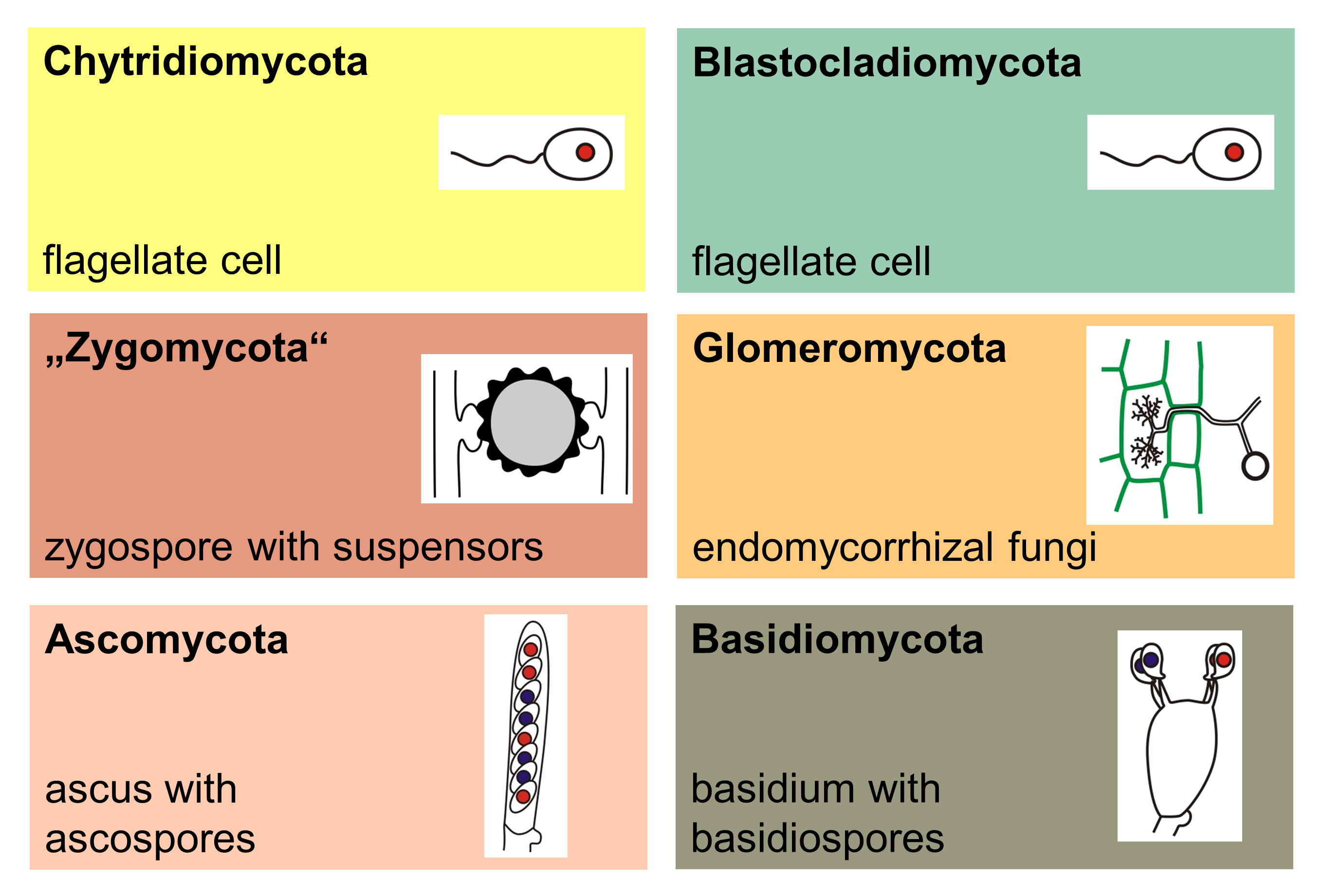 Biologische Schemata, gezeichnet und freigegeben von M. Piepenbring